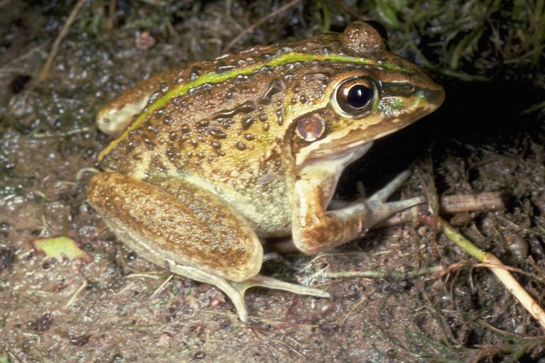 Cyclorana alboguttata